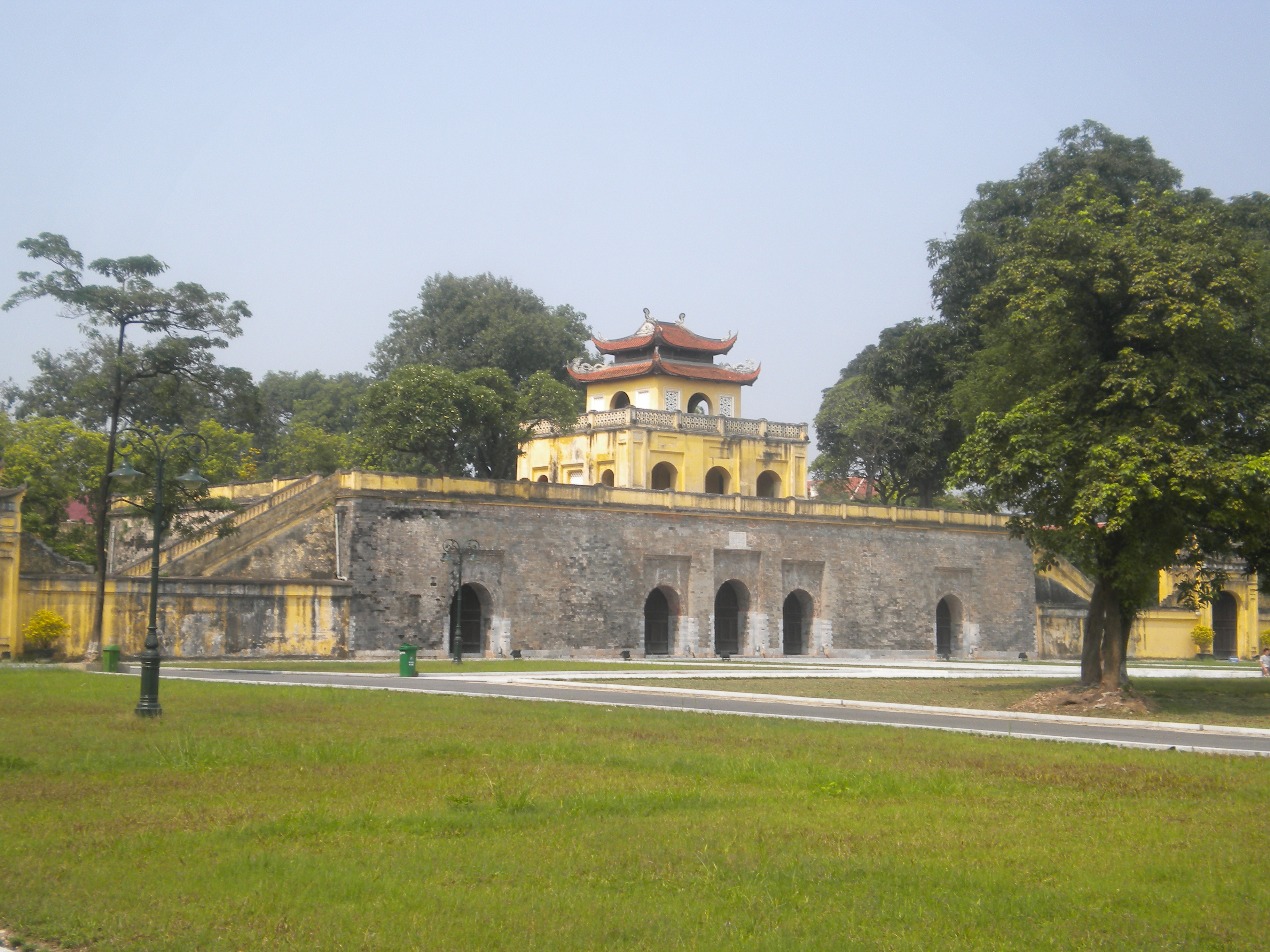 河內升龍皇城南門